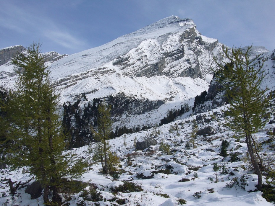 Altels von Westen